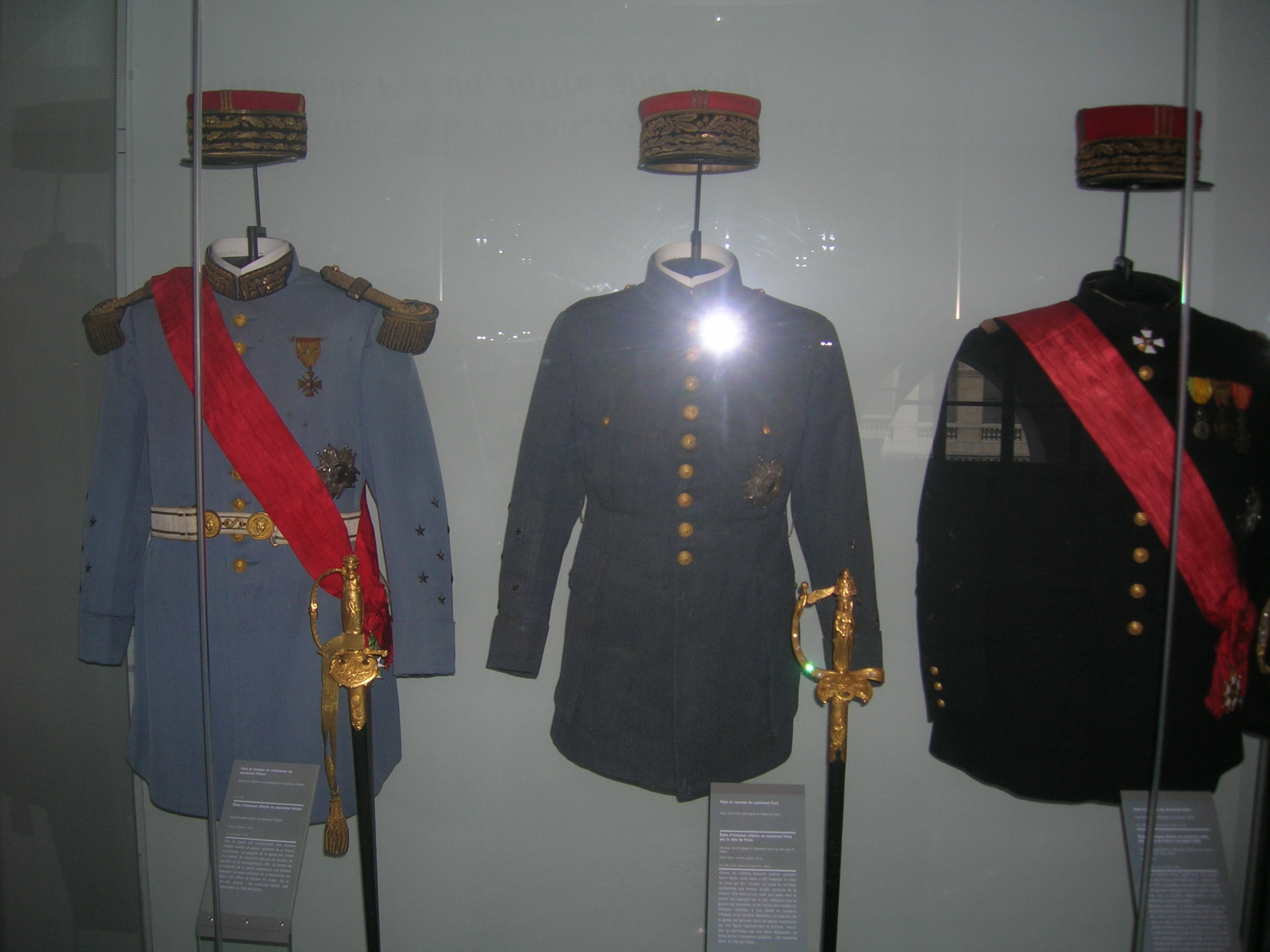 Мундиры маршалов Петэна, Фоша и Жоффра в музее Дома инвалидов